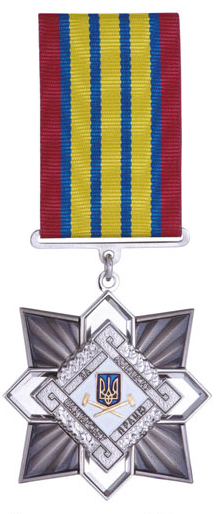 Орден «За доблесну шахтарську працю» III ступеня